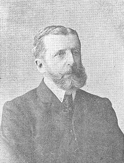 Pedro de Miranda Cárcer